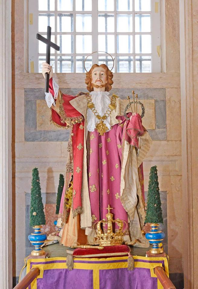 São Luís da RVISSM Imagem de São Luís Rei de França, da extinta Venerável Ordem Terceira de São Francisco de Mafra. Hoje propriedade da Real e Venerável Irmandade do Santíssimo Sacramento de Mafra. Foi mandada fazer pelo Rei Dom João V ao escultor Manuel Dias. A sua camisa é precisamente a camisa de sagração do Rei Luís XV de França que a ofereceu ao Rei Dom João V de Portugal e por sua vez para esta imagem. Durante a menoridade de Luís XV de França, o irmão mais novo do Rei D. João V de Portugal, o Infante D. Manuel, de passagem por França, assistiu à Sagração do jovem Rei, em Reims (25 de Outubro de 1722). Presume-se que tenha sido o próprio D. Manuel que trouxe a camisa da Sagração de Luís XV ao seu irmão D. João V.